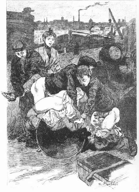 Dessins de Martin van Maele.